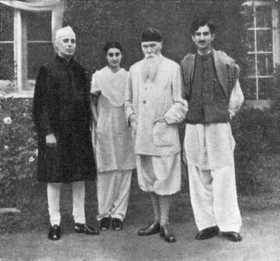 Встреча Николая Рериха с Джавахарлалом Неру и Индирой Ганди в имении Рерихов в Кулу, Индия) (справа: М.Юнус)